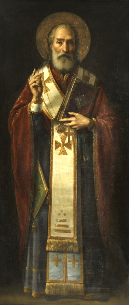 Jaroslav Čermák (1831 - 1878) - Sv. Mikuláš